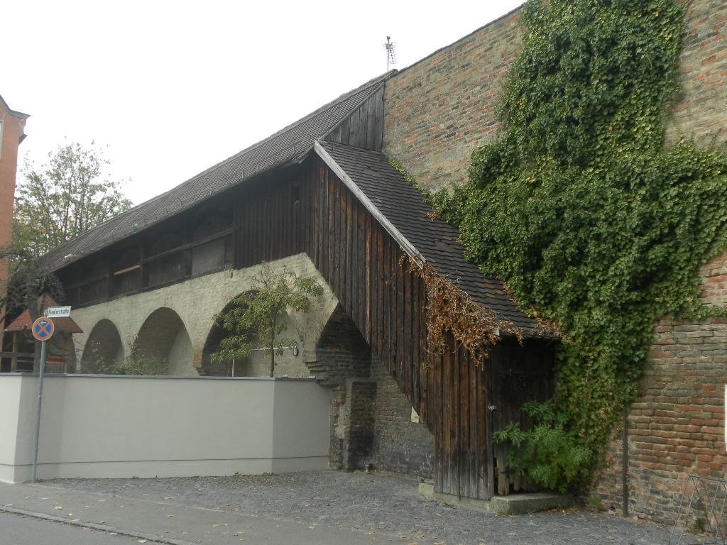 Ein Teil der Stadtmauer bei der Augsburger Kahnfahrt am Oblatterwall